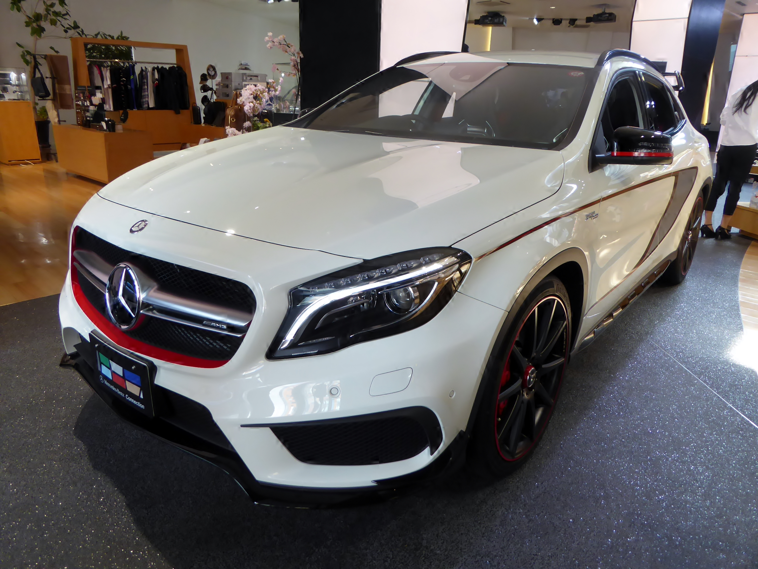 X156型メルセデス・ベンツGLA45 AMG 4マティックエディション1をフロントから撮影。